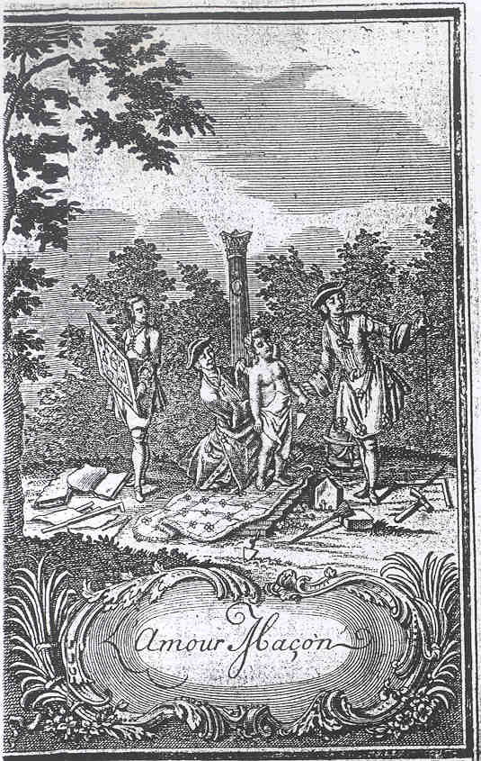 gravure représentant l'Amour Maçon